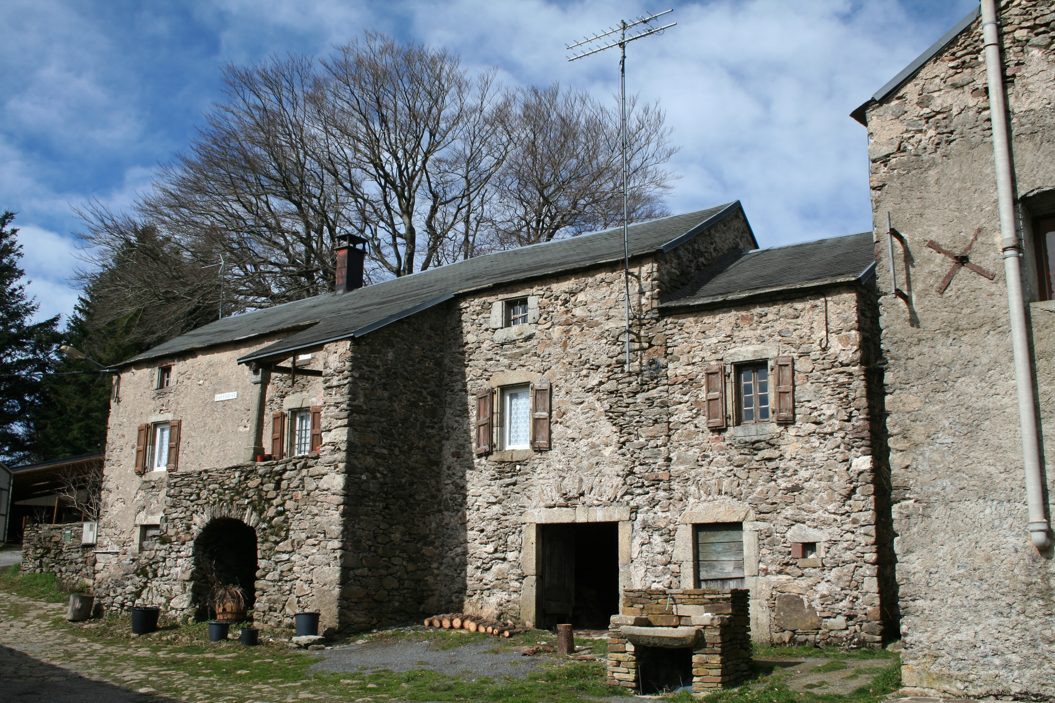 Castanet-le-Haut (Hérault) - ferme du Rec d'Agout, dite de l'Espinouse - ancienne auberge au XVIIe-XVIIIe siècles sur la route allant du Poujol au Rouergue. Aujourd'hui gîte rural. Elle a appartenu à la famille Bétirac de la fin du 16ème siècle jusqu'au début du 20ème. Les anciens propriétaires ont laissé leur nom au bois de Bétirac qui est proche de la ferme.